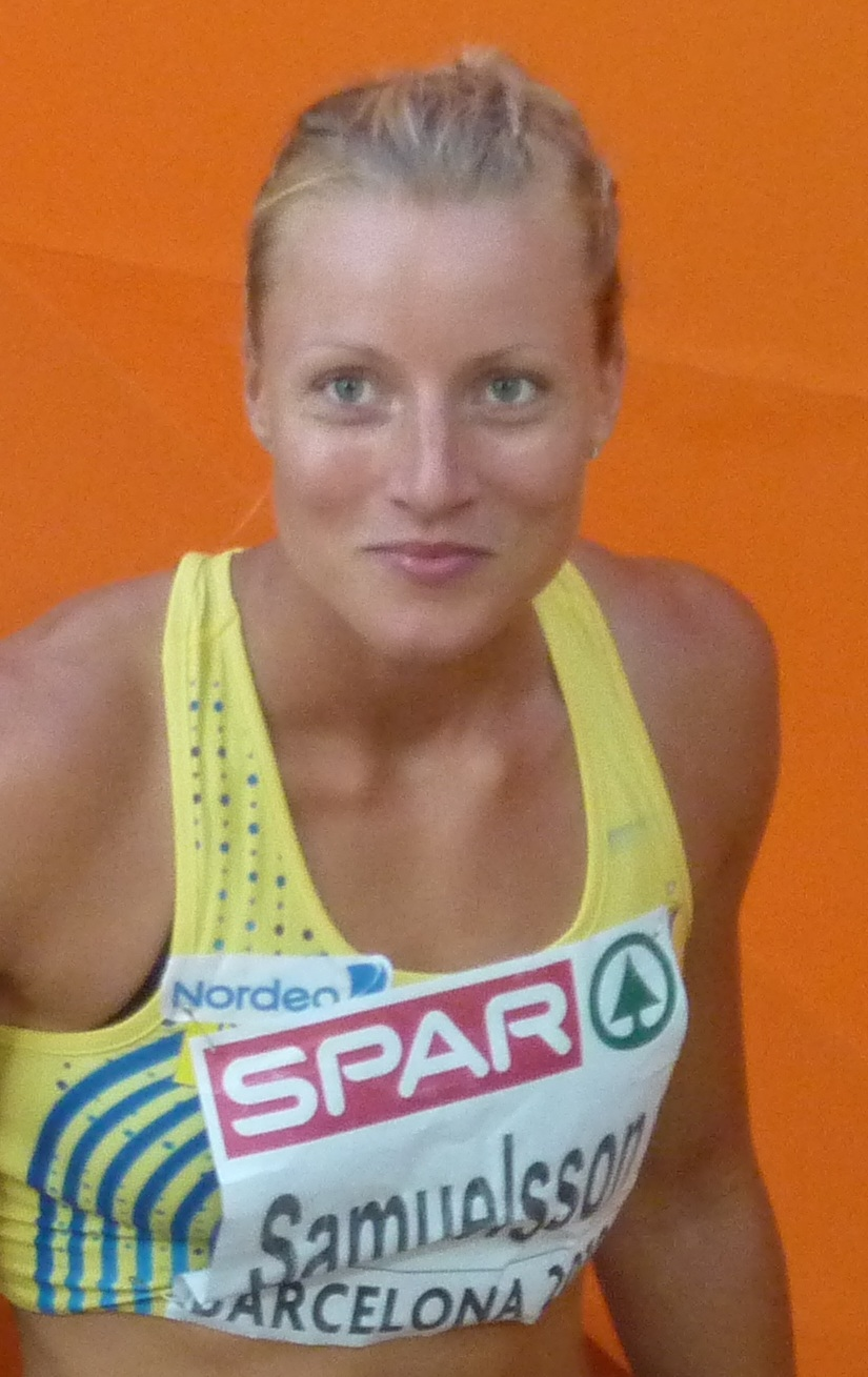 Jessica Samuelsson